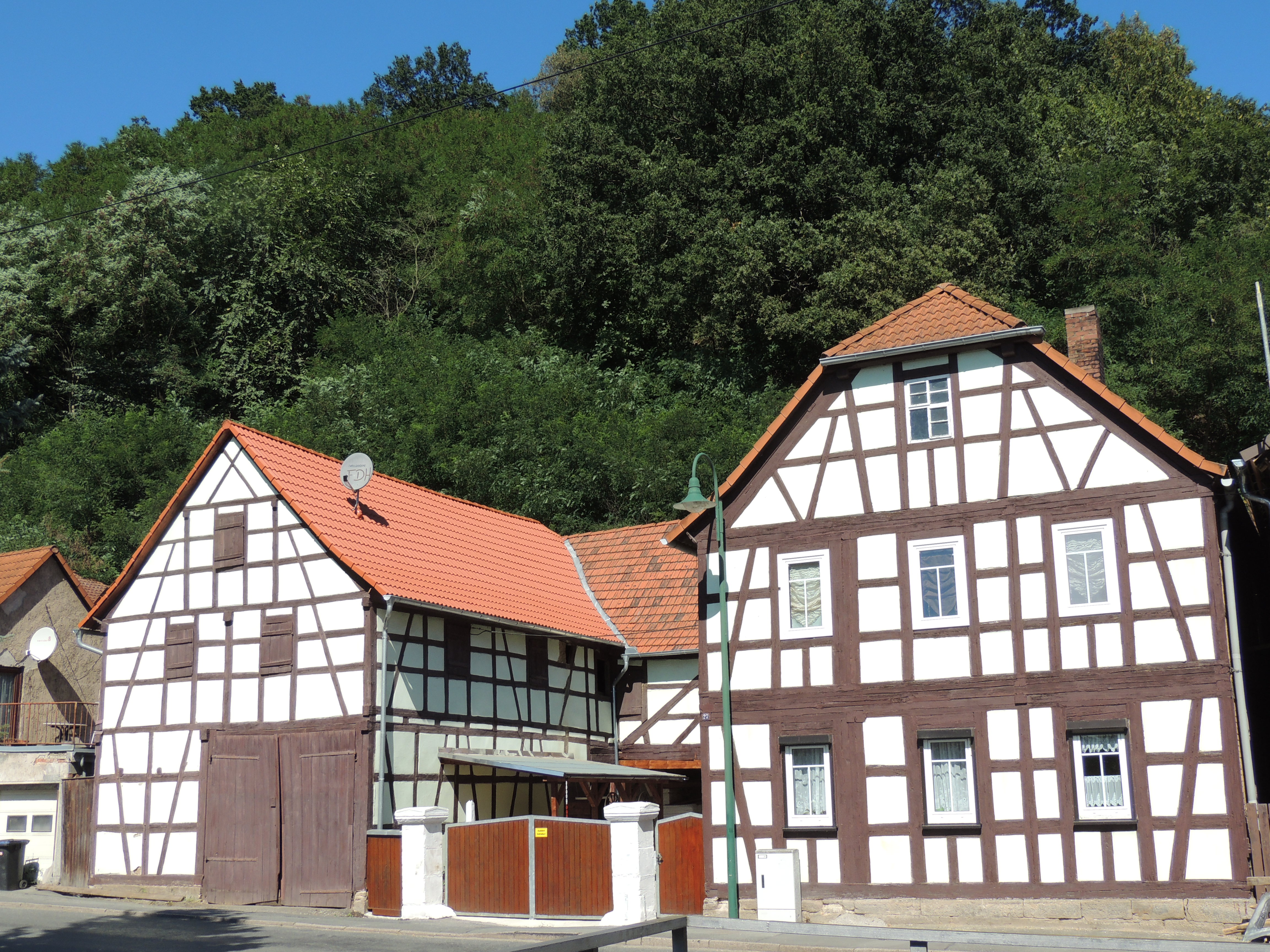 Denkmalgeschütztes Gehöft in der Erfurter Str. 27 in Zeutsch, Gemeinde Uhlstädt-Kirchhasel